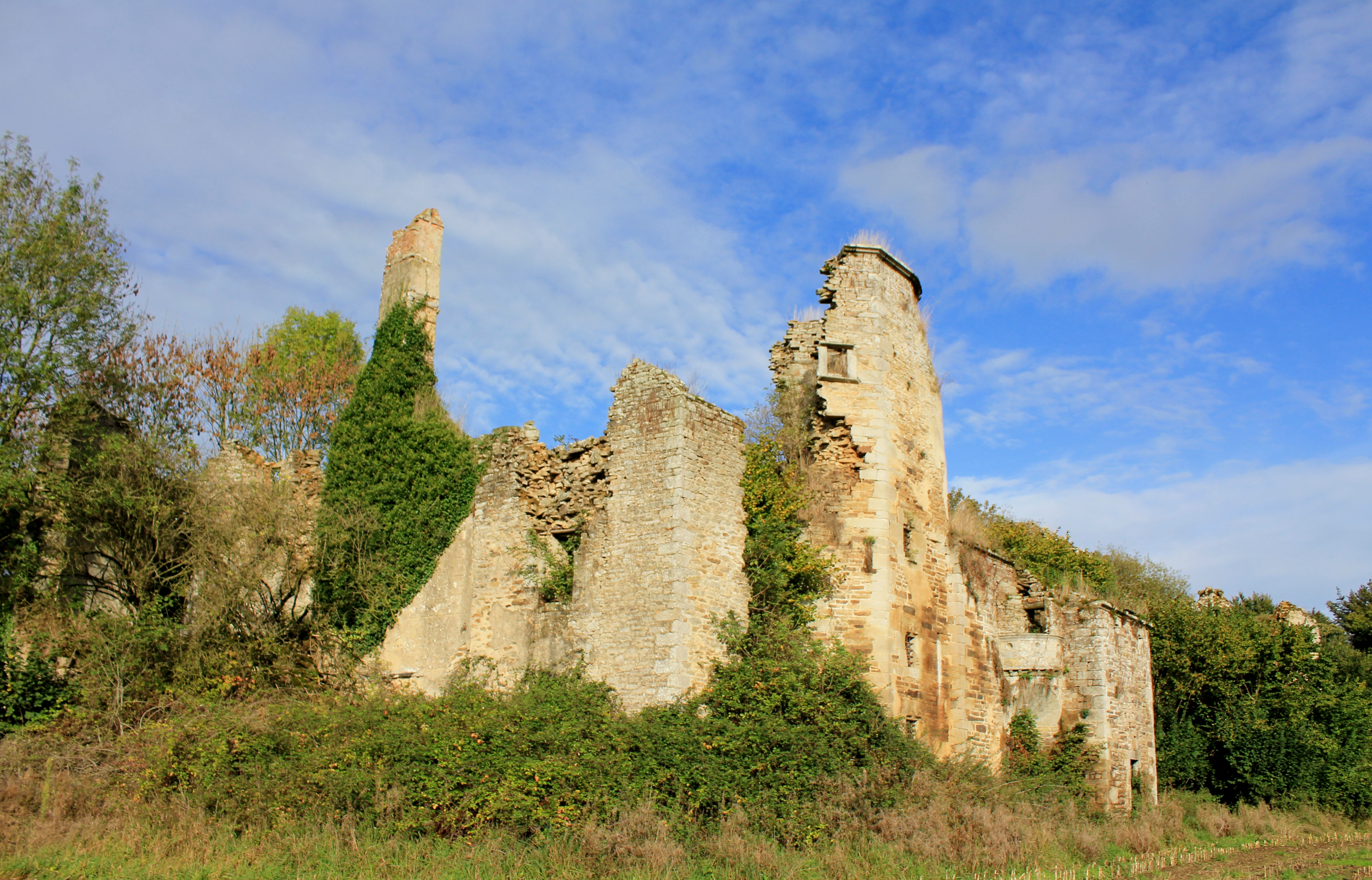 Château de Coët-Candec : vue depuis le sud-est